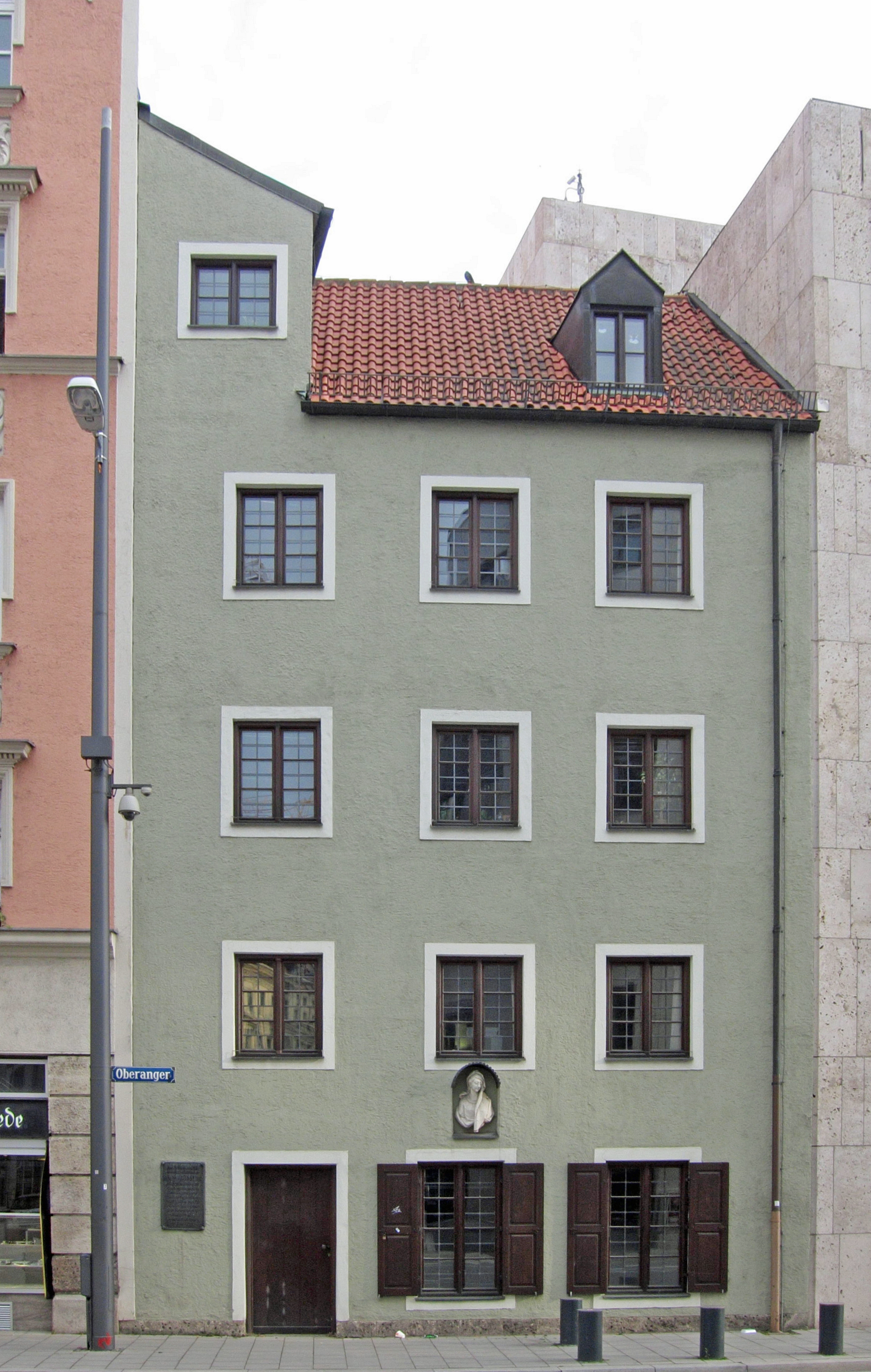 Oberanger 11; sog. Ignaz-Günther-Haus, viergeschossiges Satteldachrückgebäude mit Ohrwaschlgaube und Hausmadonna (Kopie), verbunden mit dem Haupthaus St.-Jakobs-Platz 20; Altmünchner Bürgerhaus, ehem. Wohnhaus Ignaz Günthers von 1761 bis 1775, im Kern spätmittelalterlich, Mitte 19. Jh. erneuert, 1975-77 wiederhergestellt. Linker Hausnachbar - ORAG-Haus - Oberanger 9 - 80311 München - Jakobsplatz, dreiseitig freistehendes Neubarockhaus, errichtet 1896-97 von Johann und Adam Graessel und Max Krauss - Ansicht von Osten - Haus der Bayerischen Schneidereigenossenschaft - Sie wurde 1881 gegründet und beliefert Maßschneider, Schulen, Theater und Opernhäuser sowie private Kunden, in diesem Ladengeschäft, mit Stoffen, Futter, Einlagen, Knöpfen, Fäden, Reißverschlüssen etc. - eine Tafel kündet davon, dass hier einmal ein Bad war: "Ein Bad vor Zeiten hier bestand, Gighanbad war es genannt".